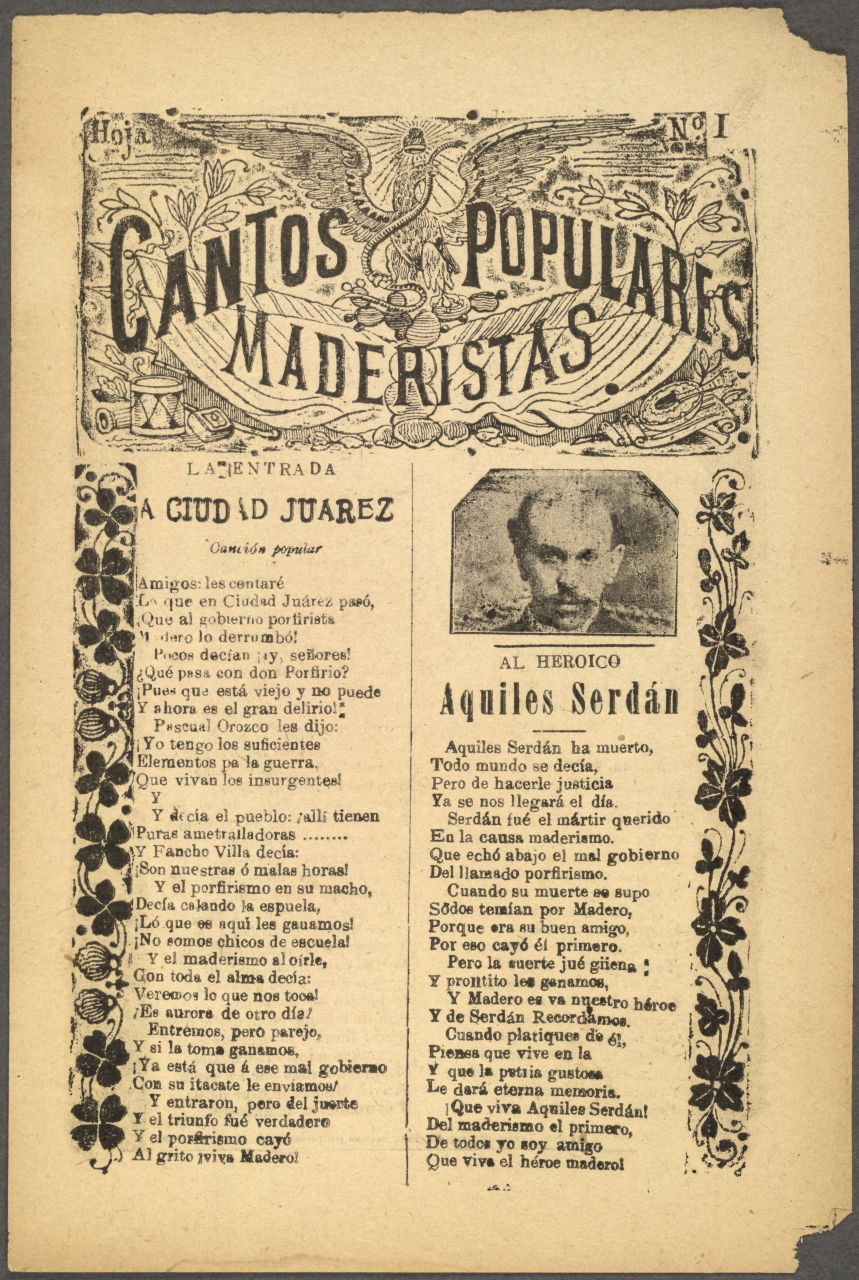 Cantos Populares Maderistas: La entrada a Ciudad Juárez canción popular Al heroico Aquiles Serdán